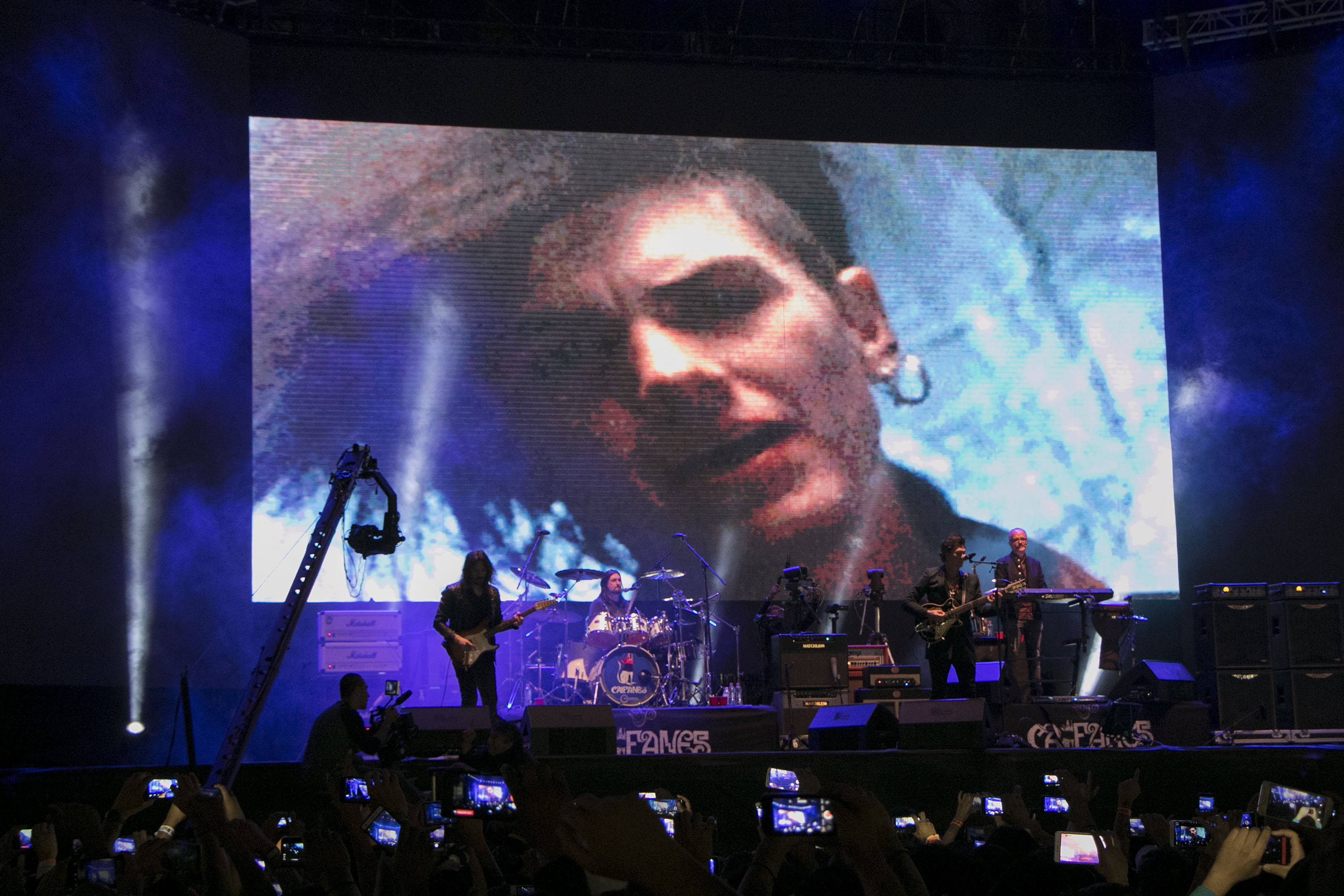 Viernes 10 de noviembre de 2017. Zócalo de la Ciudad de México, como parte de la Semana de las Juventudes se realizó un concierto masivo con el grupo mexicano Caifanes quien festejó sus 30 años de trayectoria. Fotografía: Tania Victoria/ Secretaría de Cultura CDMX